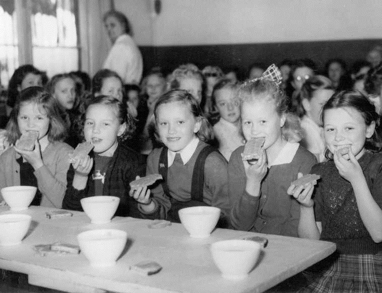 Bekkelaget skole, interiør, skoleelever, jenter, skolebespisning, skolefrokost, Oslofrokost.